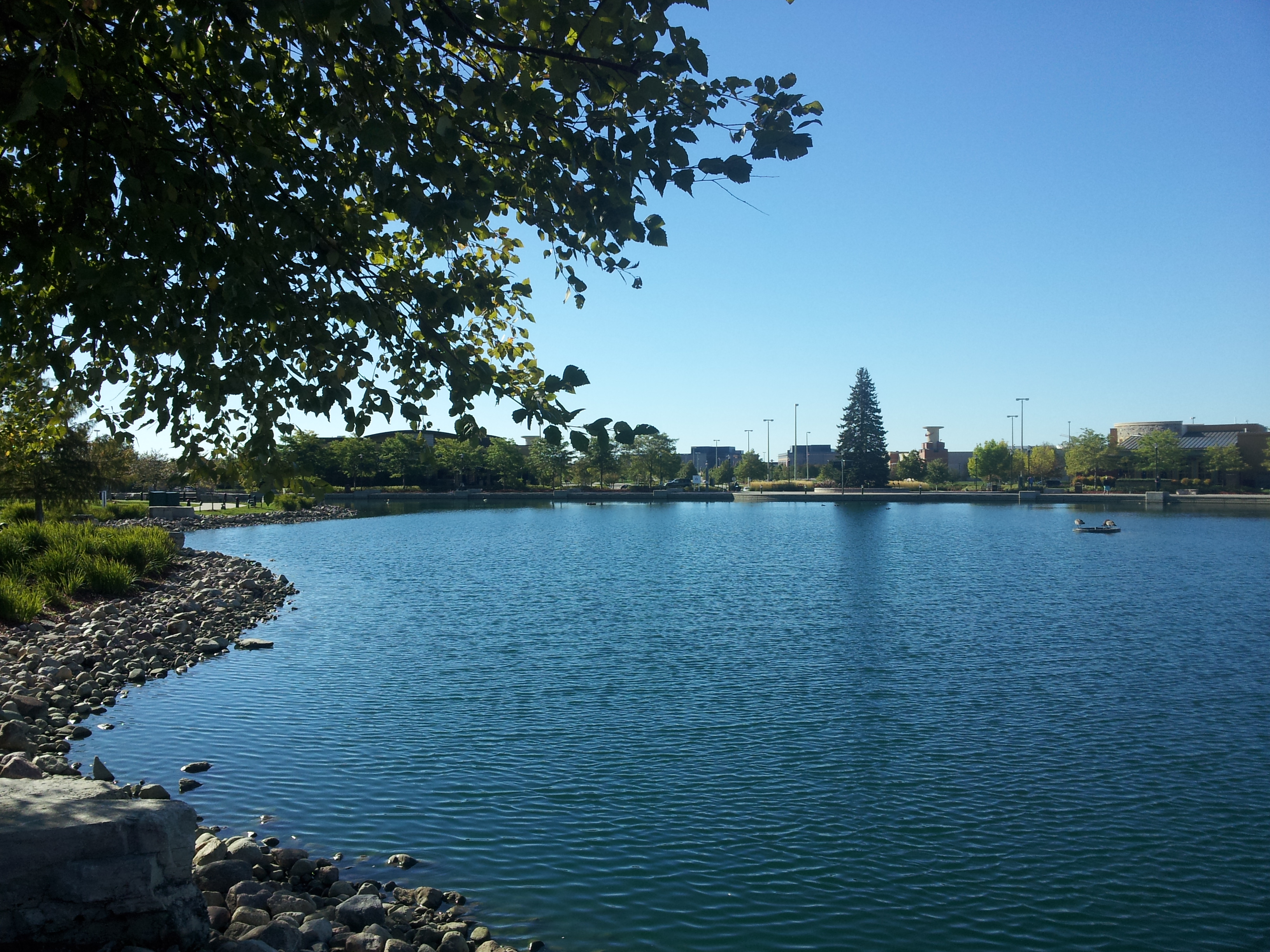 West Des Moines, IA, USA